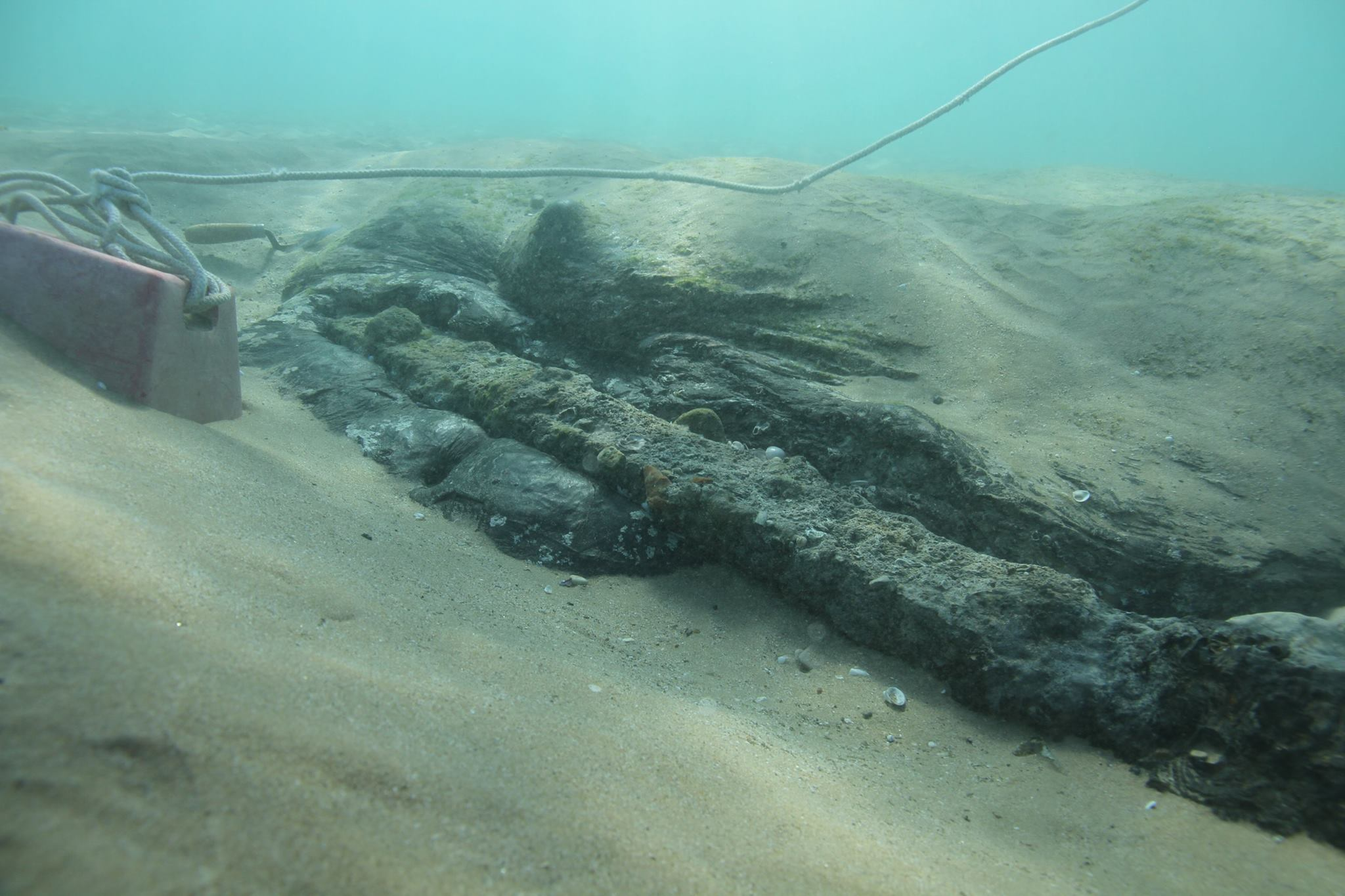 Probables restes del brulot De Marsay, que incendià els galions De Guisa i Mare de Déu de la Victòria i La Madalena, localitzades al 2015 prop de la platja de Sitges. Imatge de Bruno Parés per al Consorci del Patrimoni de Sitges.